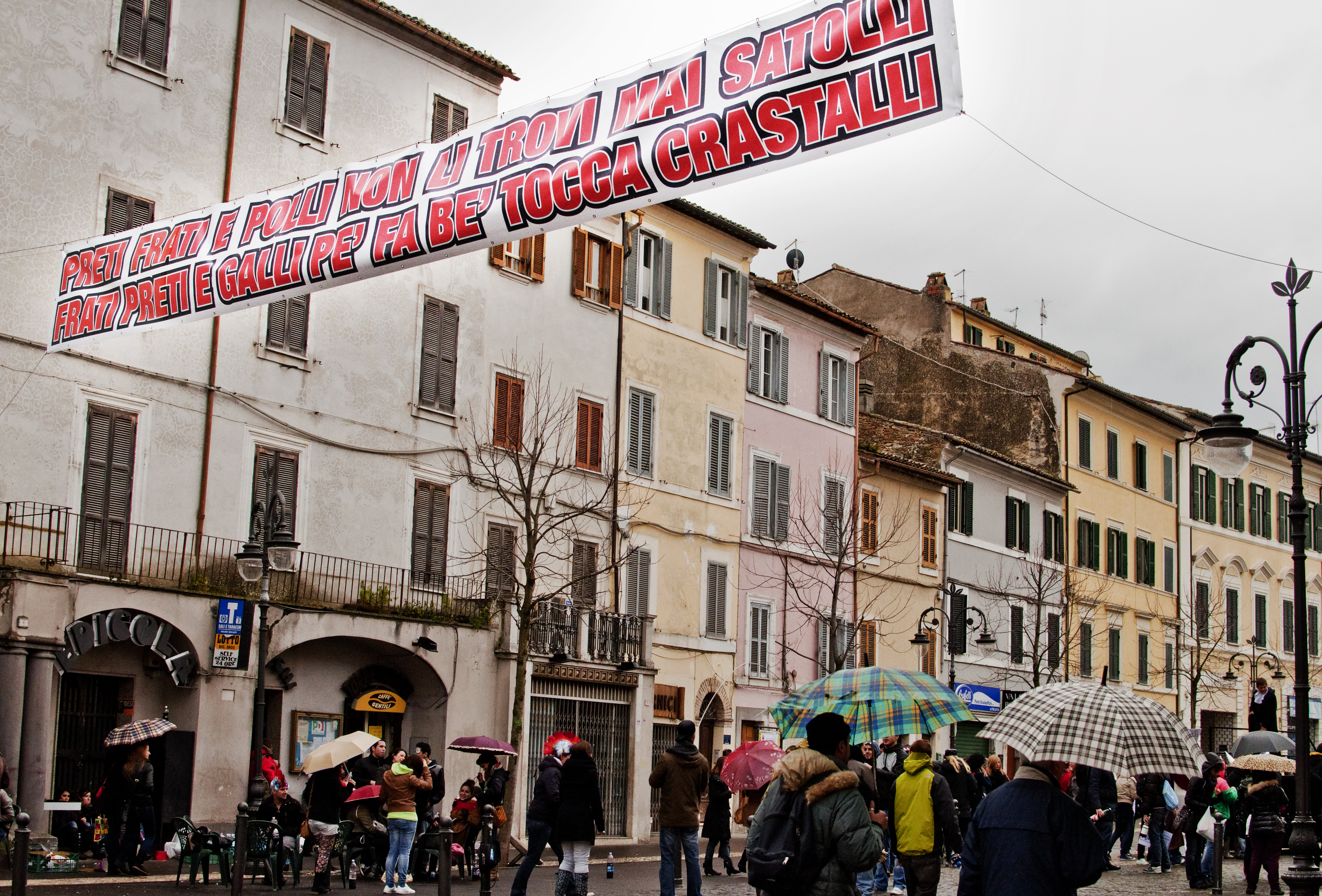 Striscione con la scritta: "Preti frati e polli non li trovi mai satolli. Frati preti e galli pe' fa be' tocca crastalli". Carnevalone Liberato di Poggio Mirteto (Rieti), 13 marzo 2011